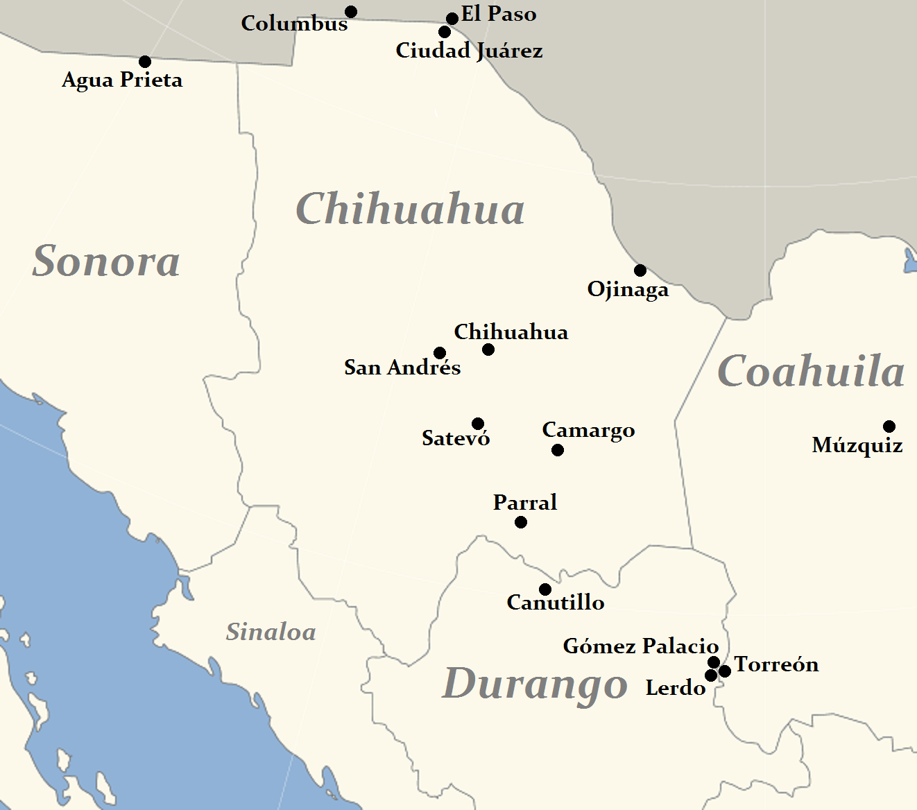 Chihuahua és környéke fontos forradalmi helyszínekkel